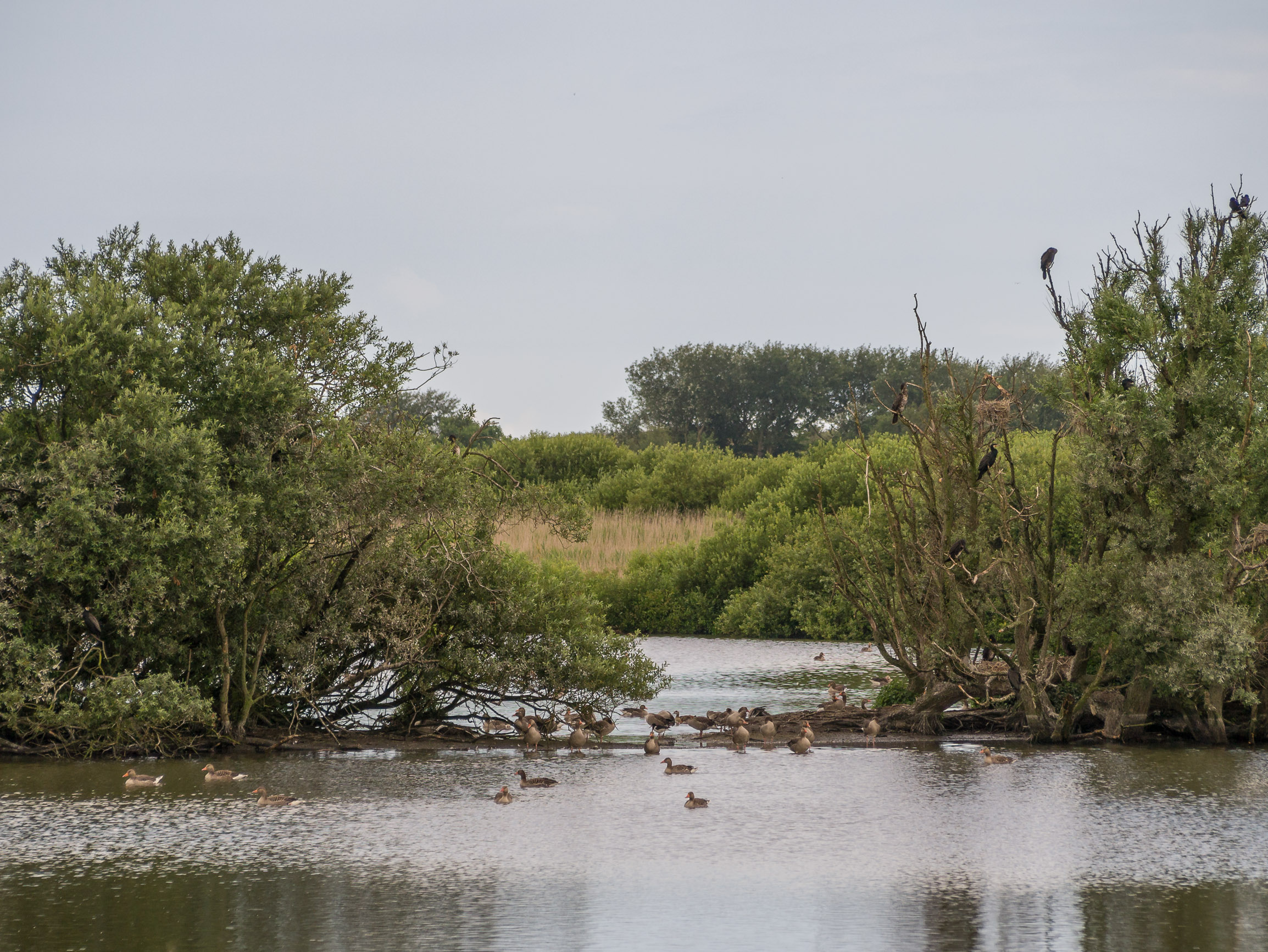 Gevogelte in de Westerplas op Schiermonnikoog This is a photo or sound file made in Schiermonnikoog National Park in the Netherlands, with the main subject of the file in the category: animals